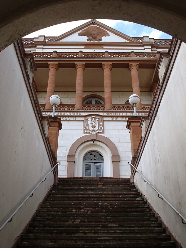 Acesso ao prédio histórico da Cúria Metropolitana de Porto Alegre, Brasil.